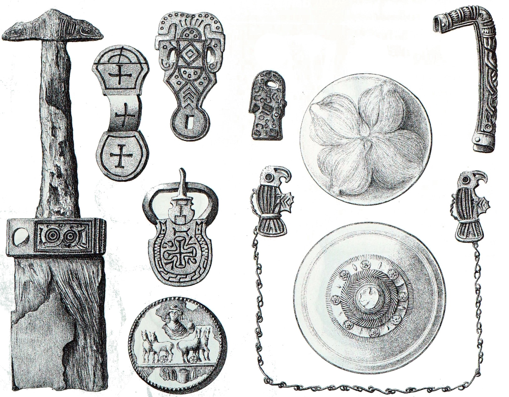 objet de fouilles archéologiques.